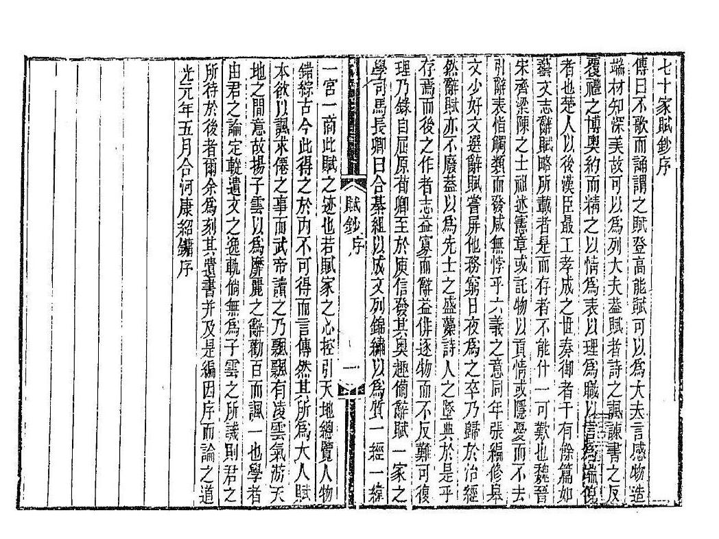 七十家賦鈔, Qishijia Fuchao（Collection of Poems by Seventy Poets）